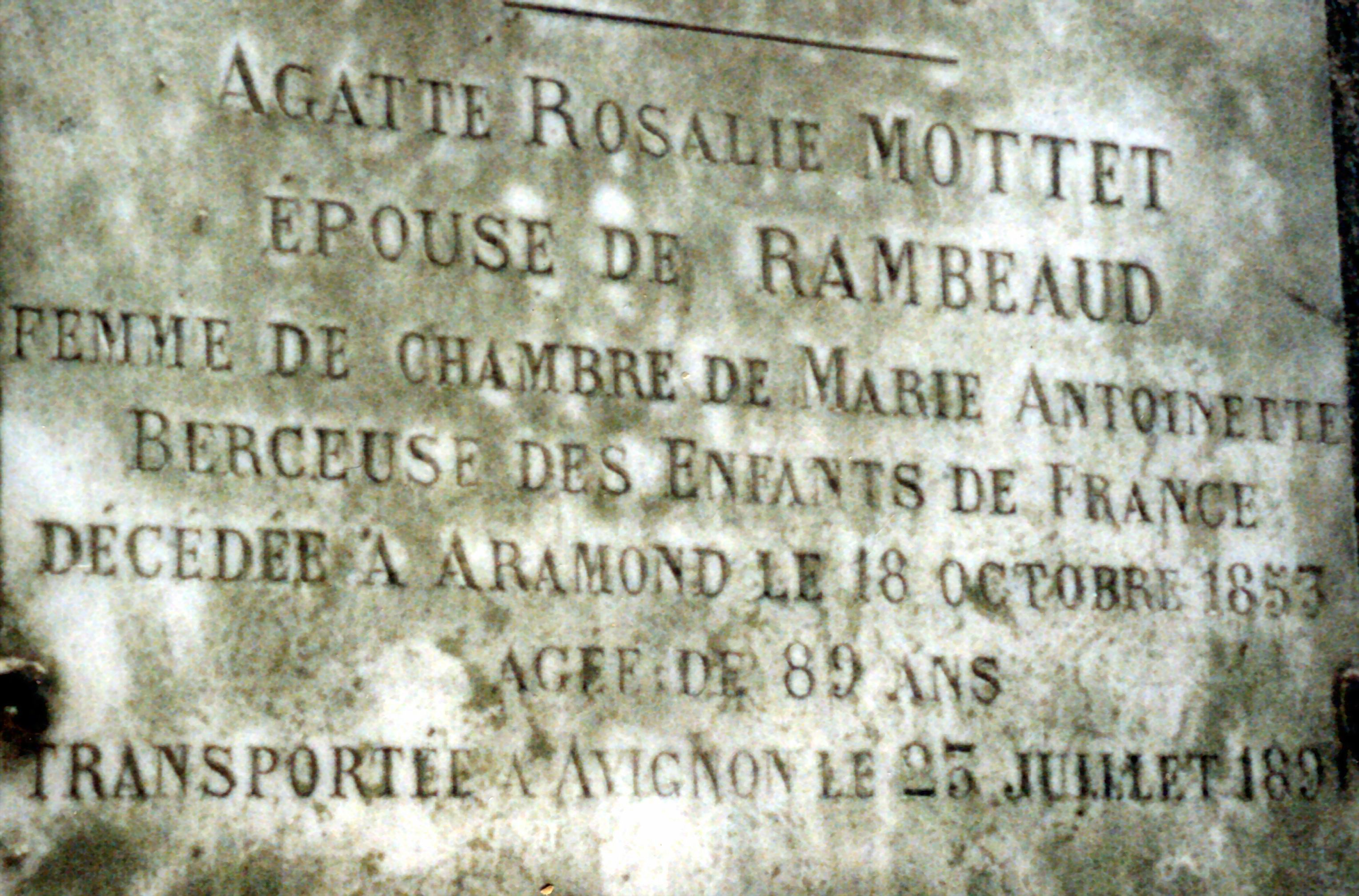 Agathe de Rambaud, Versailles palais des Tuileries Famille Mottet